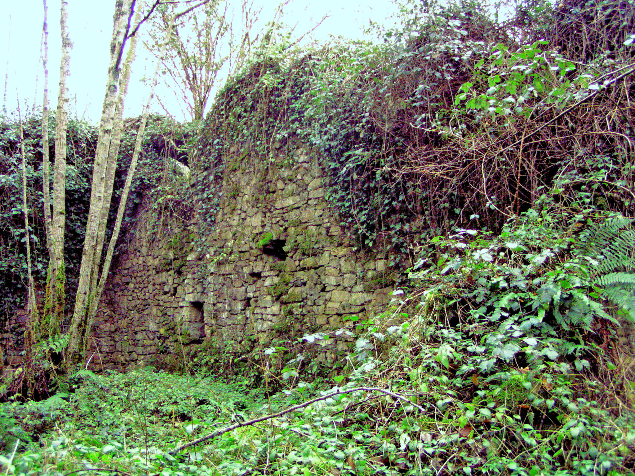 Atxulondo burdinolaren hondakinak gaur